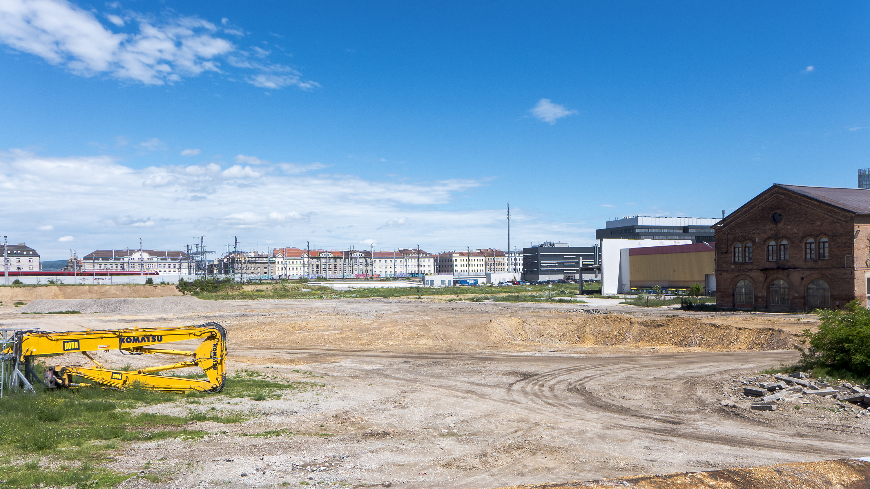 Neues Landgut in Wien 10